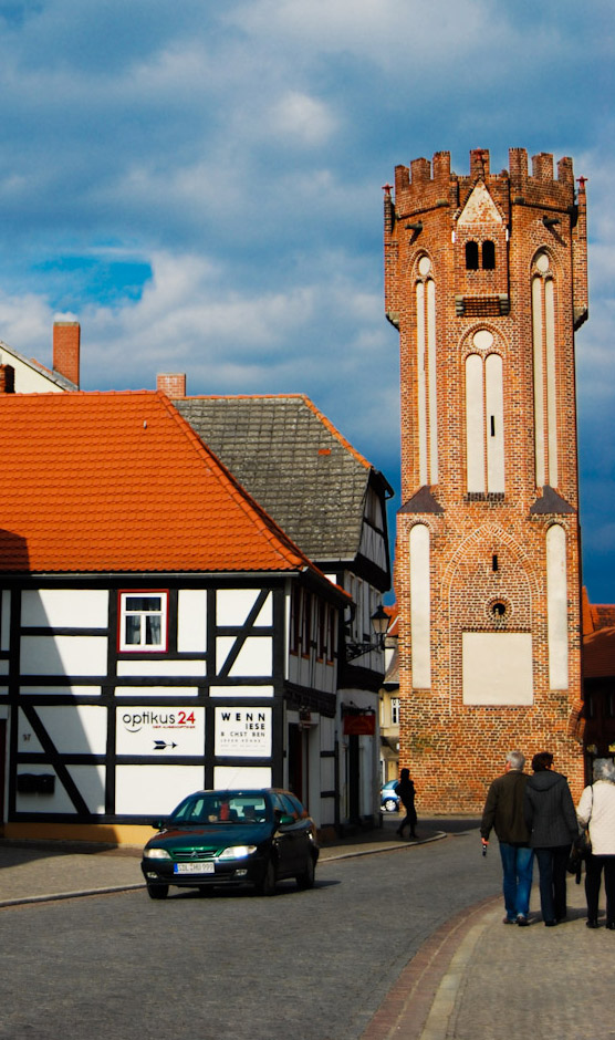 Der Eulenturm in Tangermünde.